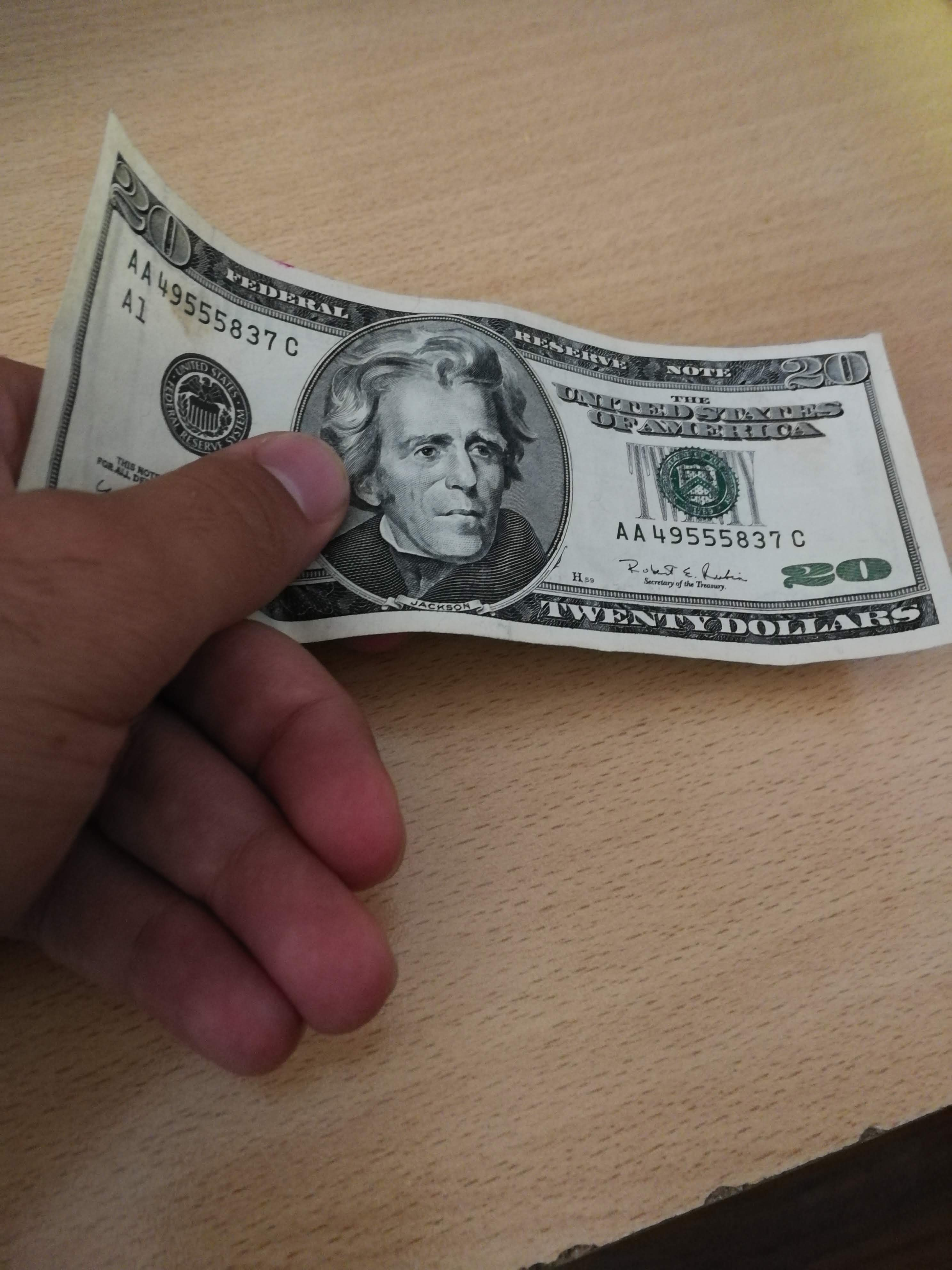 Billete de 20 dolares